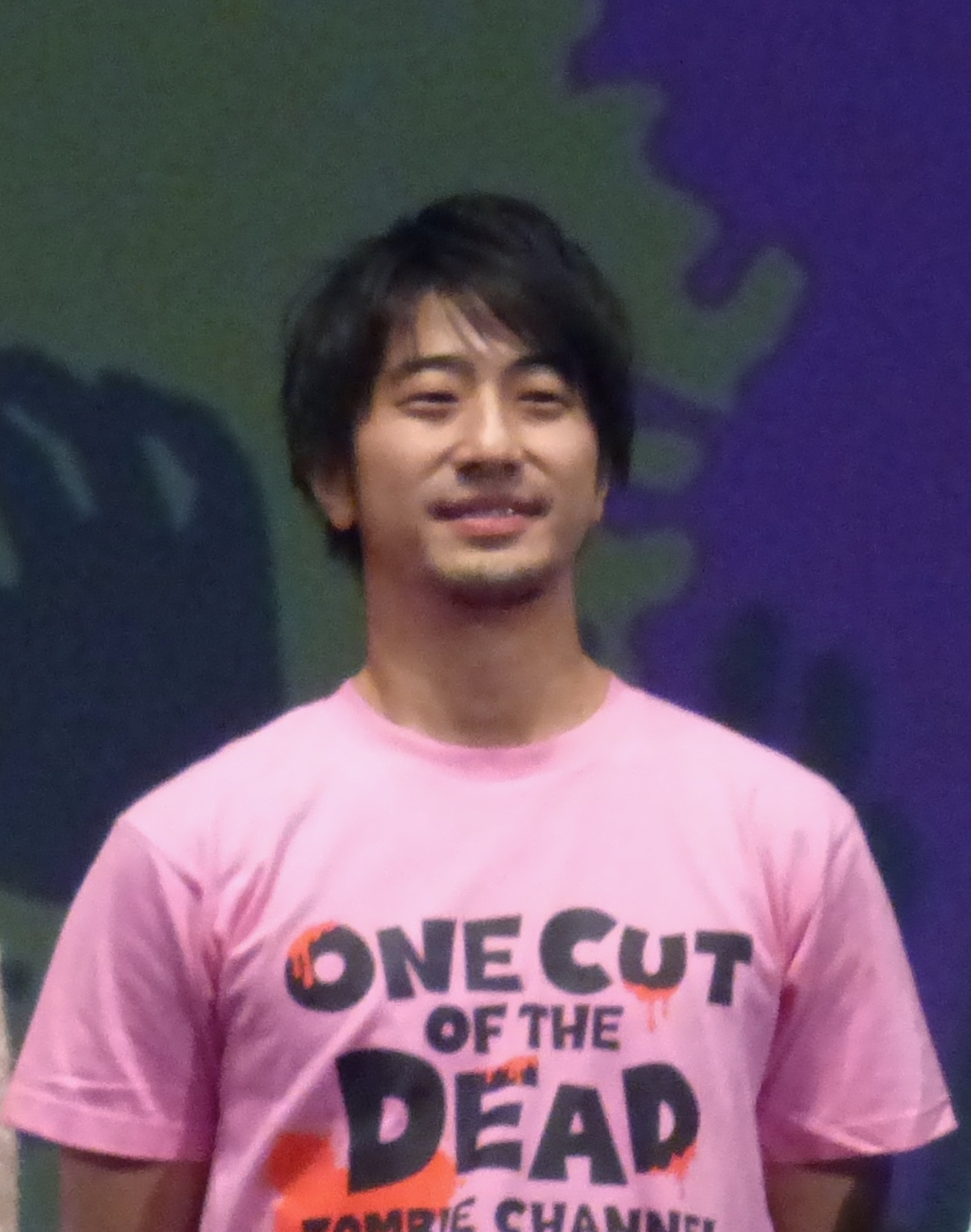 イワゴウサトシ（岩合智史）（2018年11月22日、Zeppダイバーシティ東京「最高かよ〜！『カメ止め！』アツアツ感染者集会〜ポンデミック2018〜」）